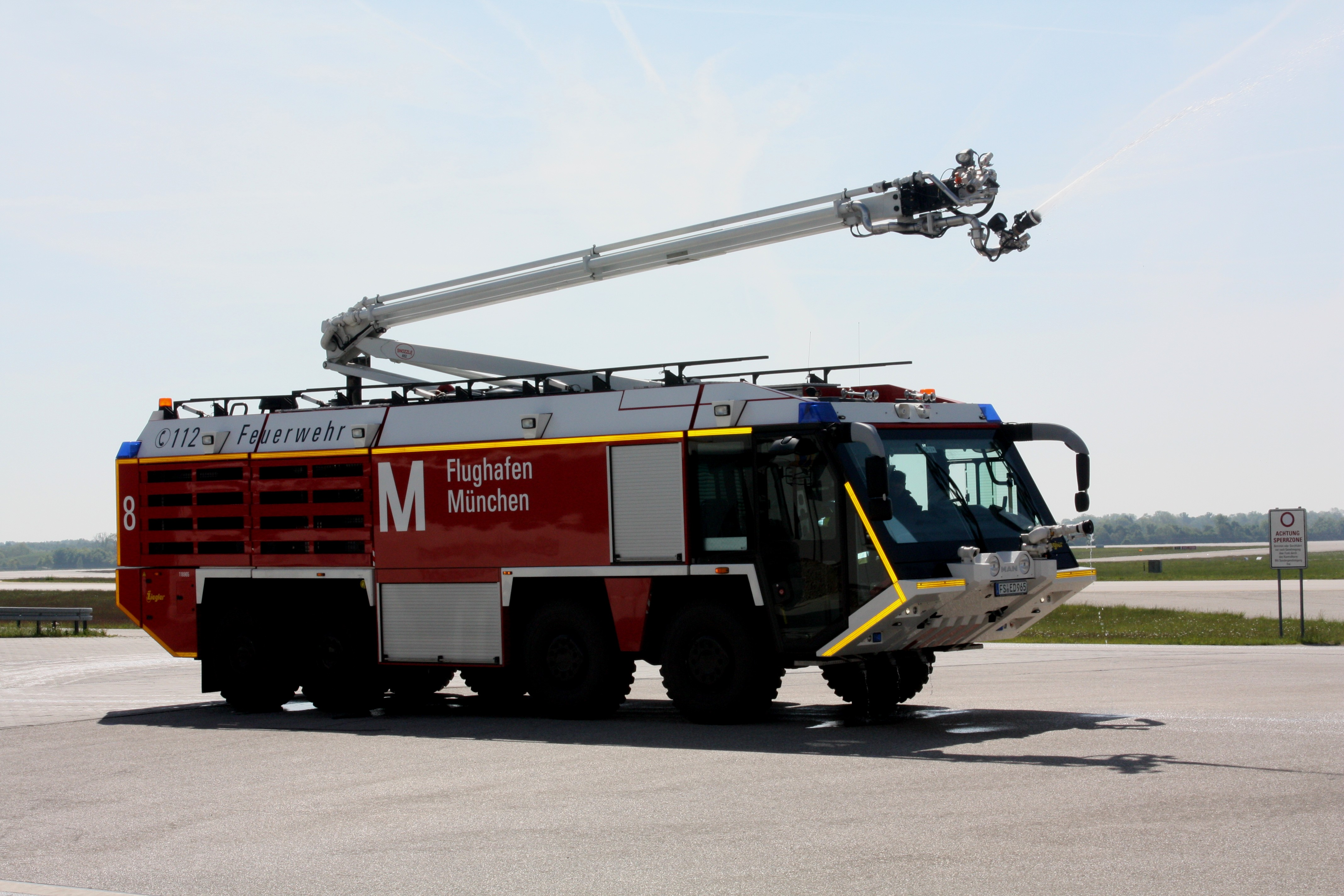 Flugfeldlöschfahrzeug Ziegler Z8, Flughafen München. Wasserkanone am Ausleger im Einsatz